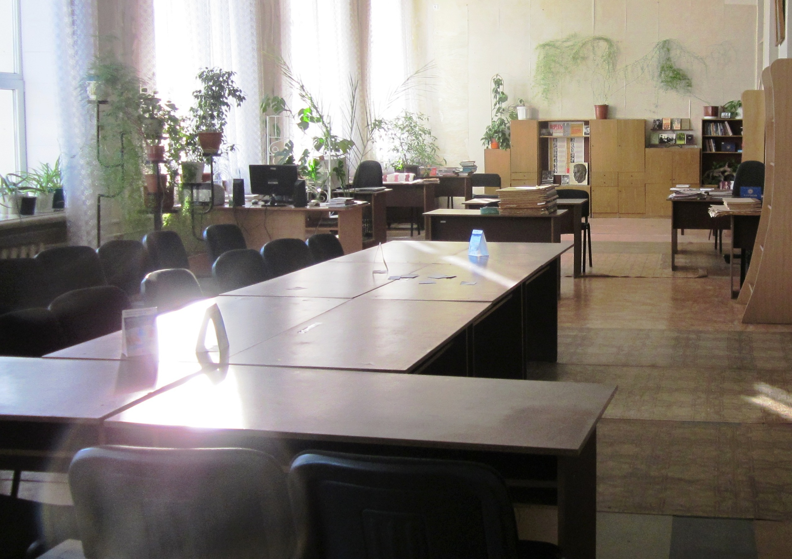 Отдел краеведческой информации